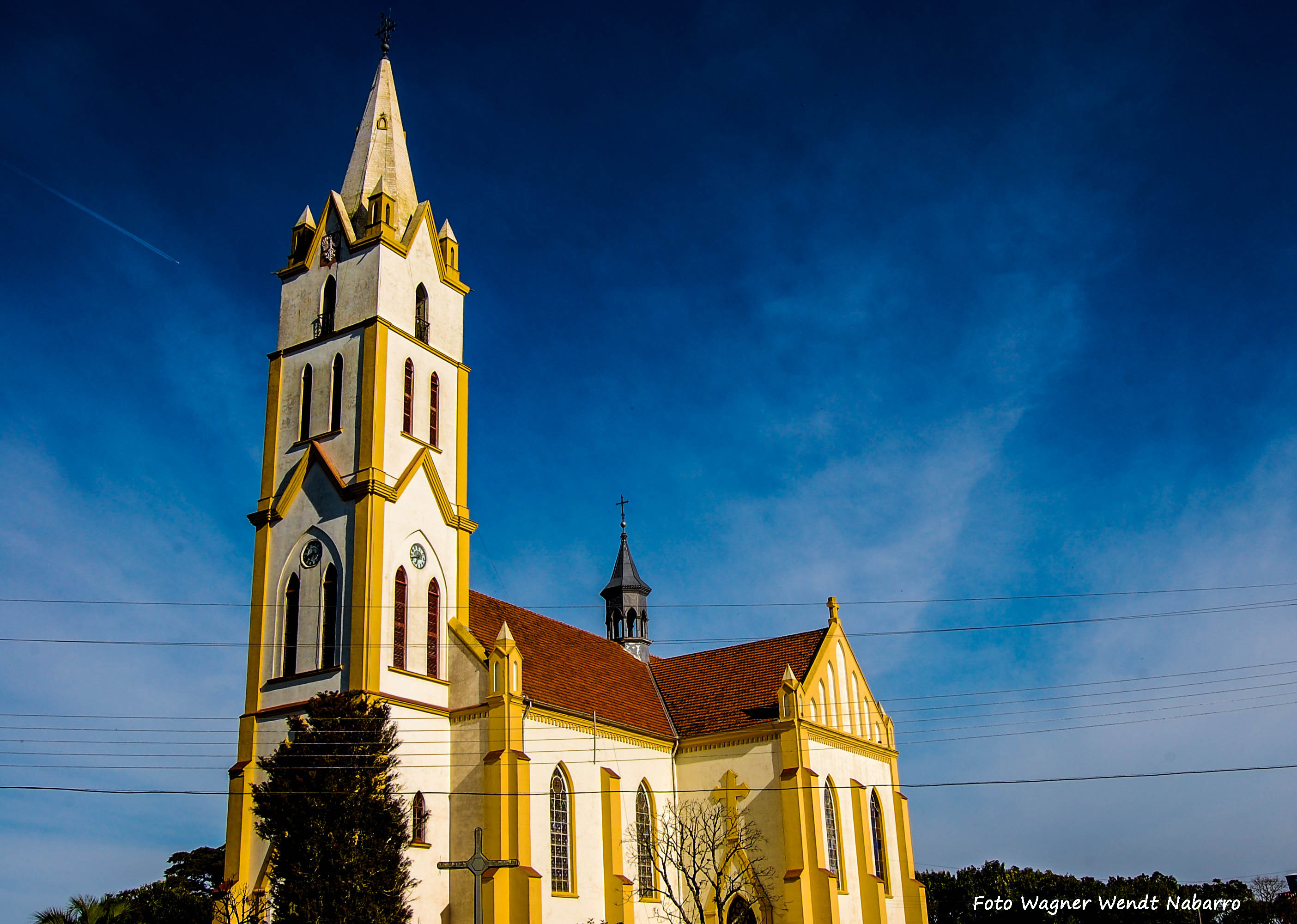 Igreja de Santo Estanislau em Paraguaçu, Itaiópolis, Santa Catarina, Brasil